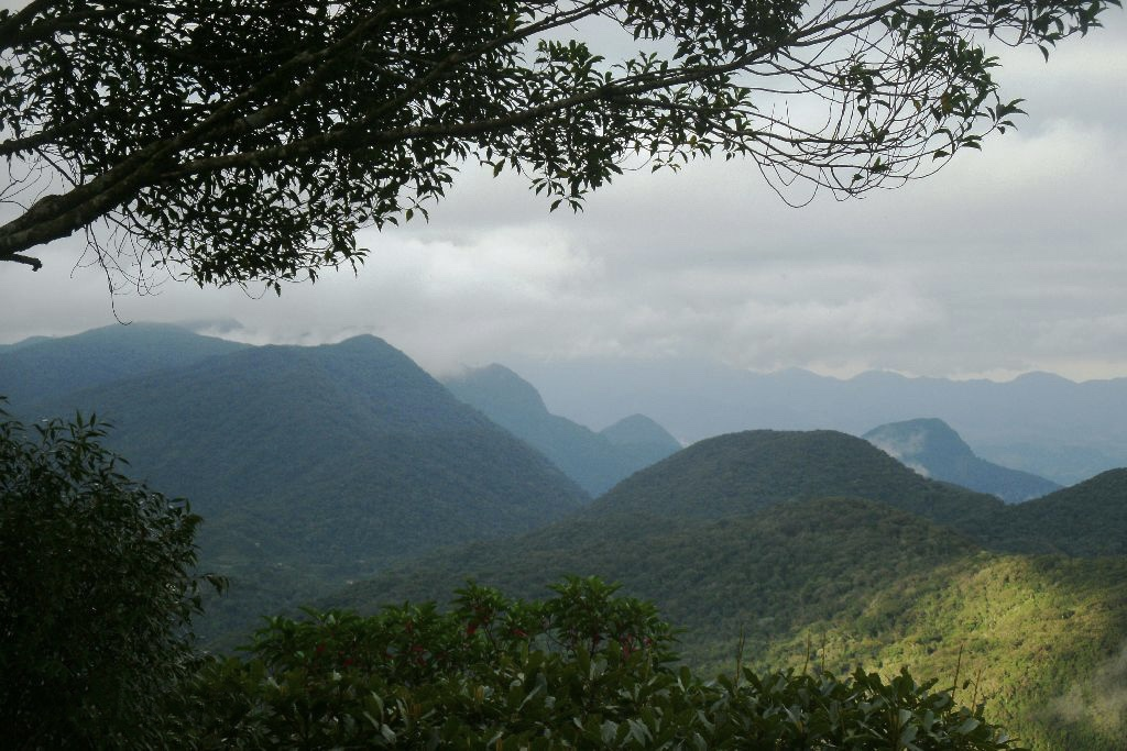 Serra dos Órgãos